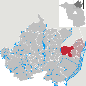 Casekow in Brandenburg, Landkreis Uckermark